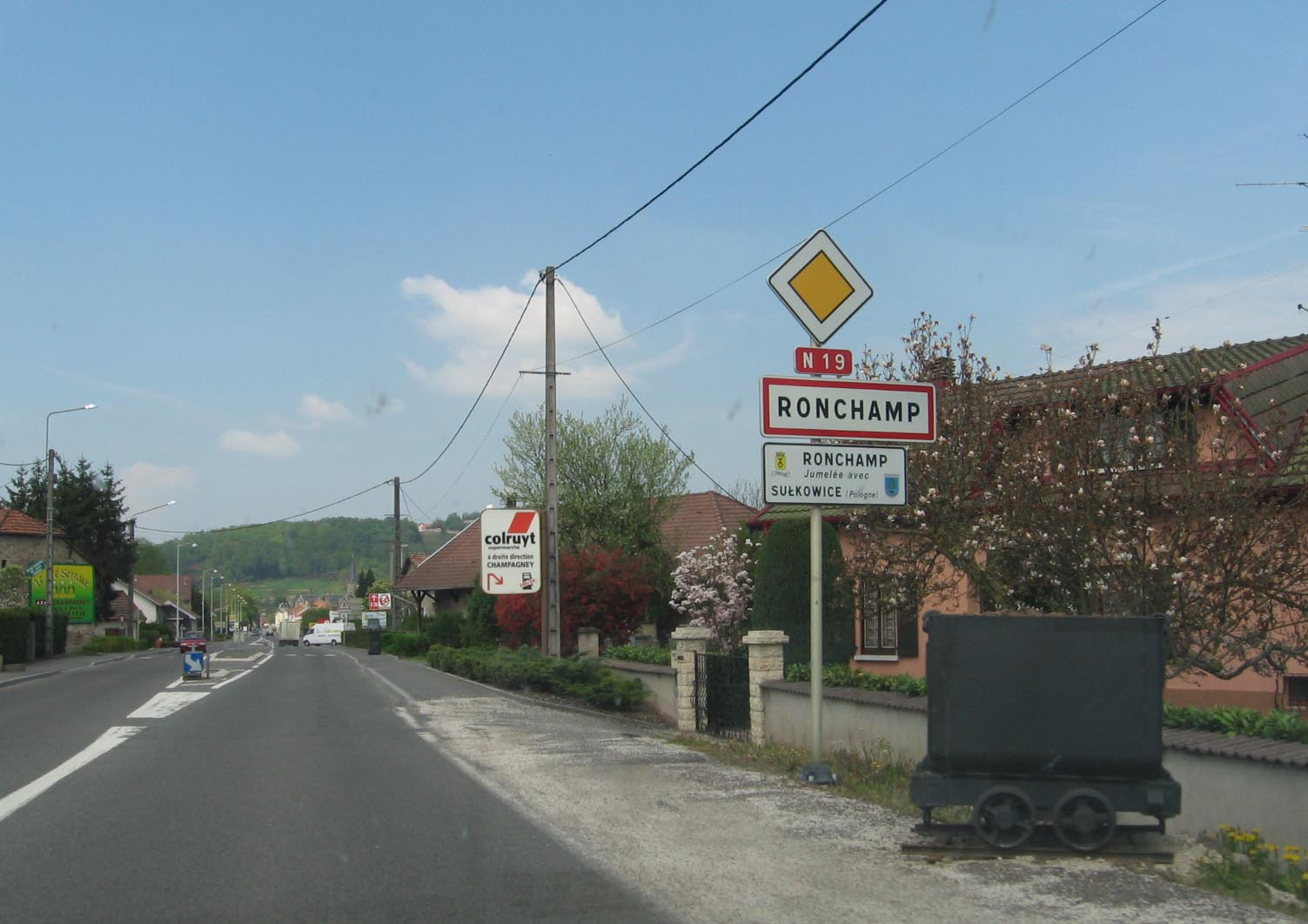 Ronchamp, may 2006